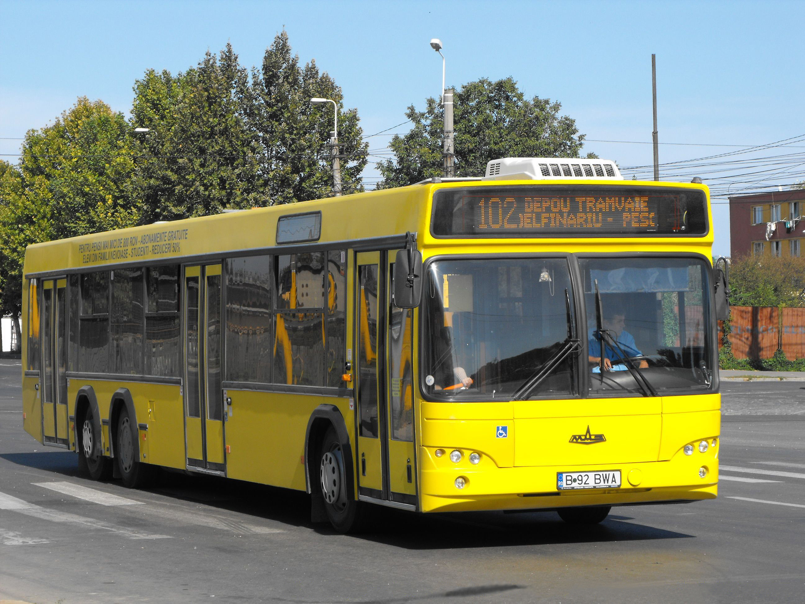 Autobuz MAZ 107 în oraşul Constanţa, România